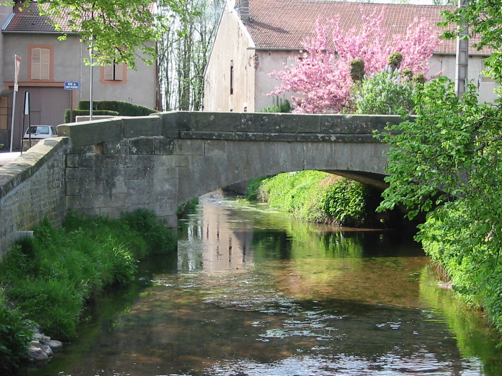 La Belvitte Affluent de la Mortagne Commune de Ménil-sur-Belvitte (88700) Photographie personnelle, prise le 4 mai 2006 Copyright © Christian Amet